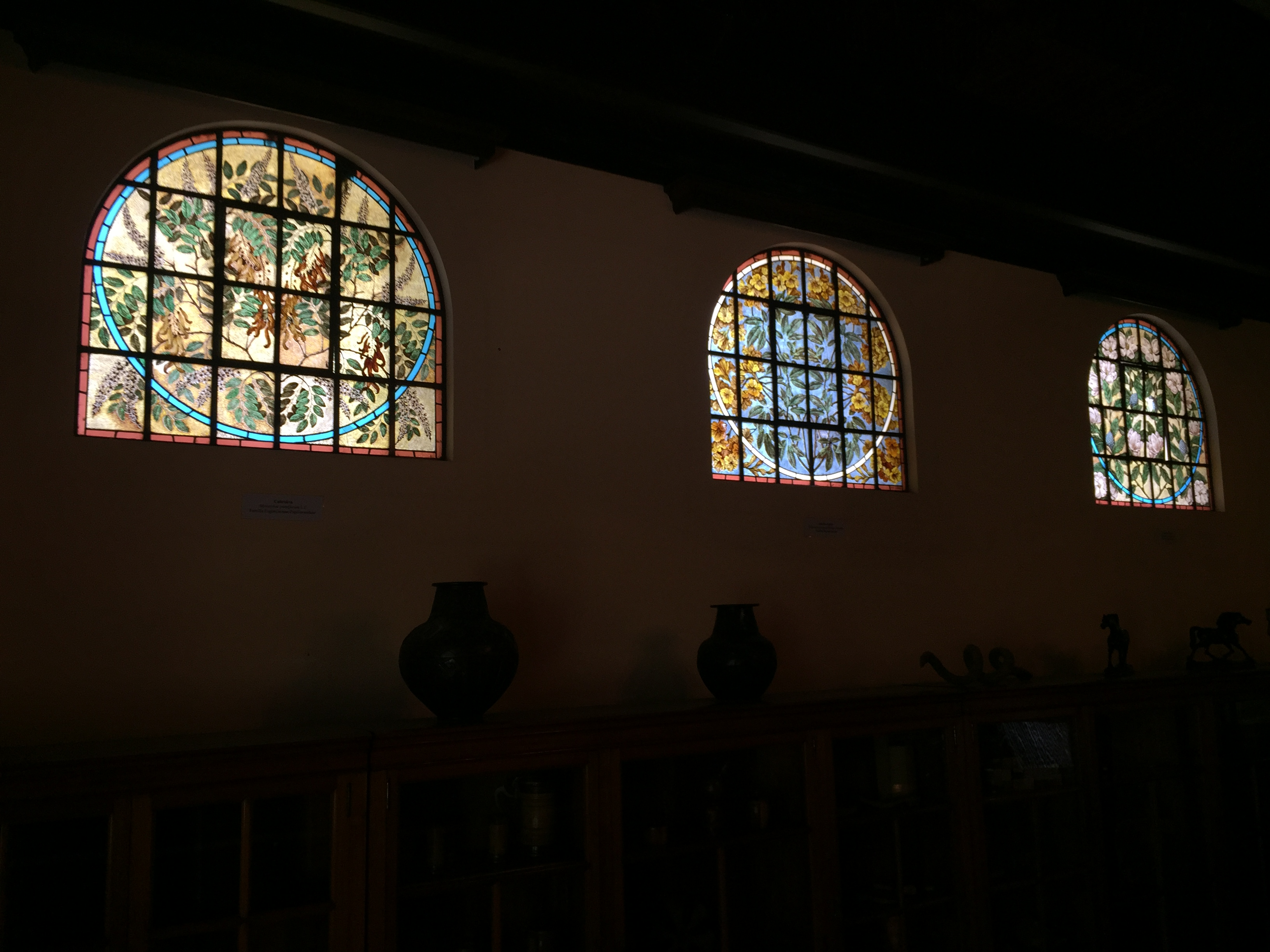 Vitrais da Ala Fernando Costas